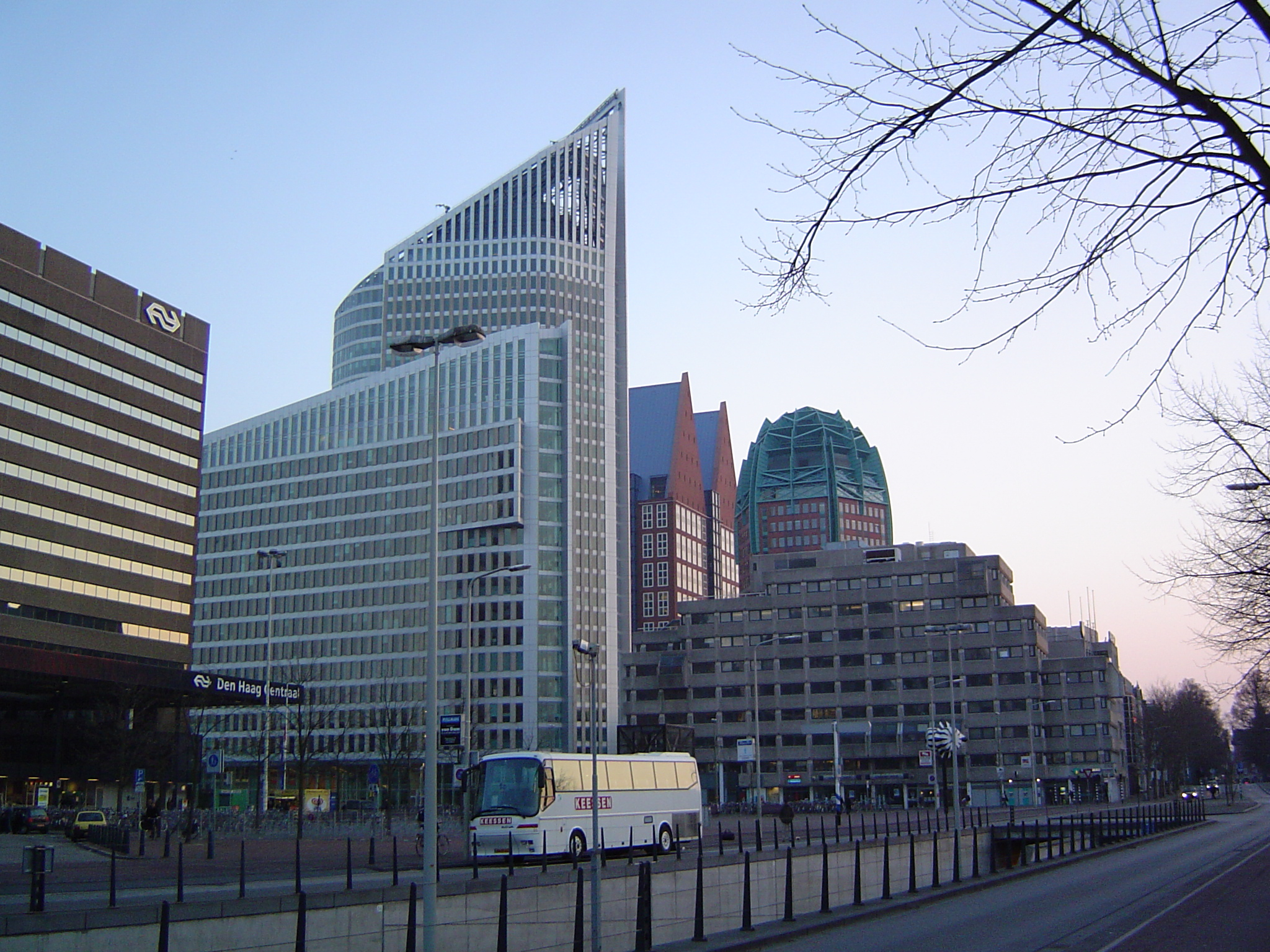 Skyline, Den Haag, The Netherlands Central Station, Ministerie OCW, Ministerie VWS, Bellevue (Ministerie VROM) Made by Joris van Rooden on 05-09-2004